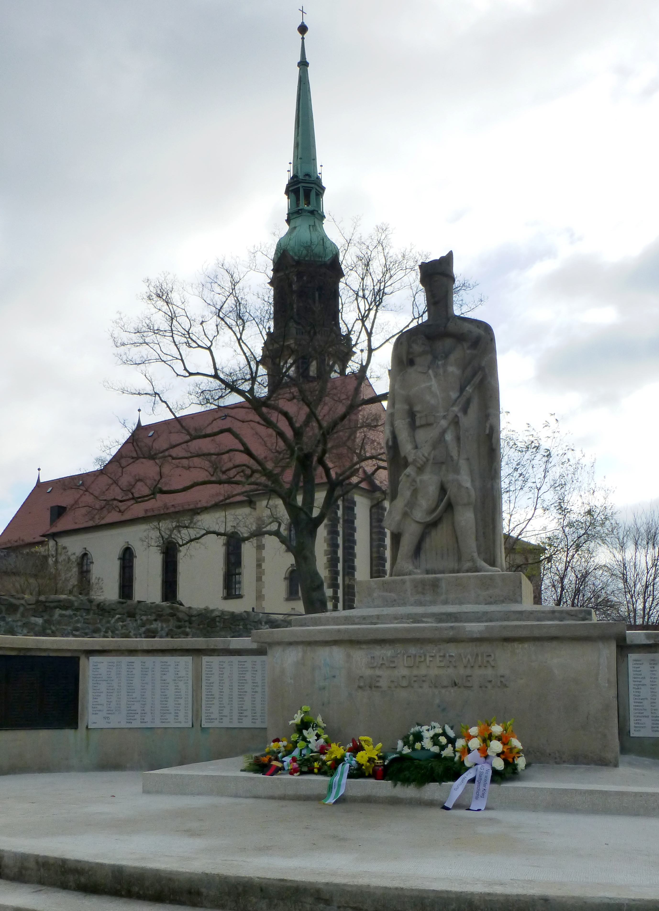 Kriegerdenkmal 1927 Radeberg restauriert, eingeweiht 19. November 2017. Hintergrund: Stadtkirche